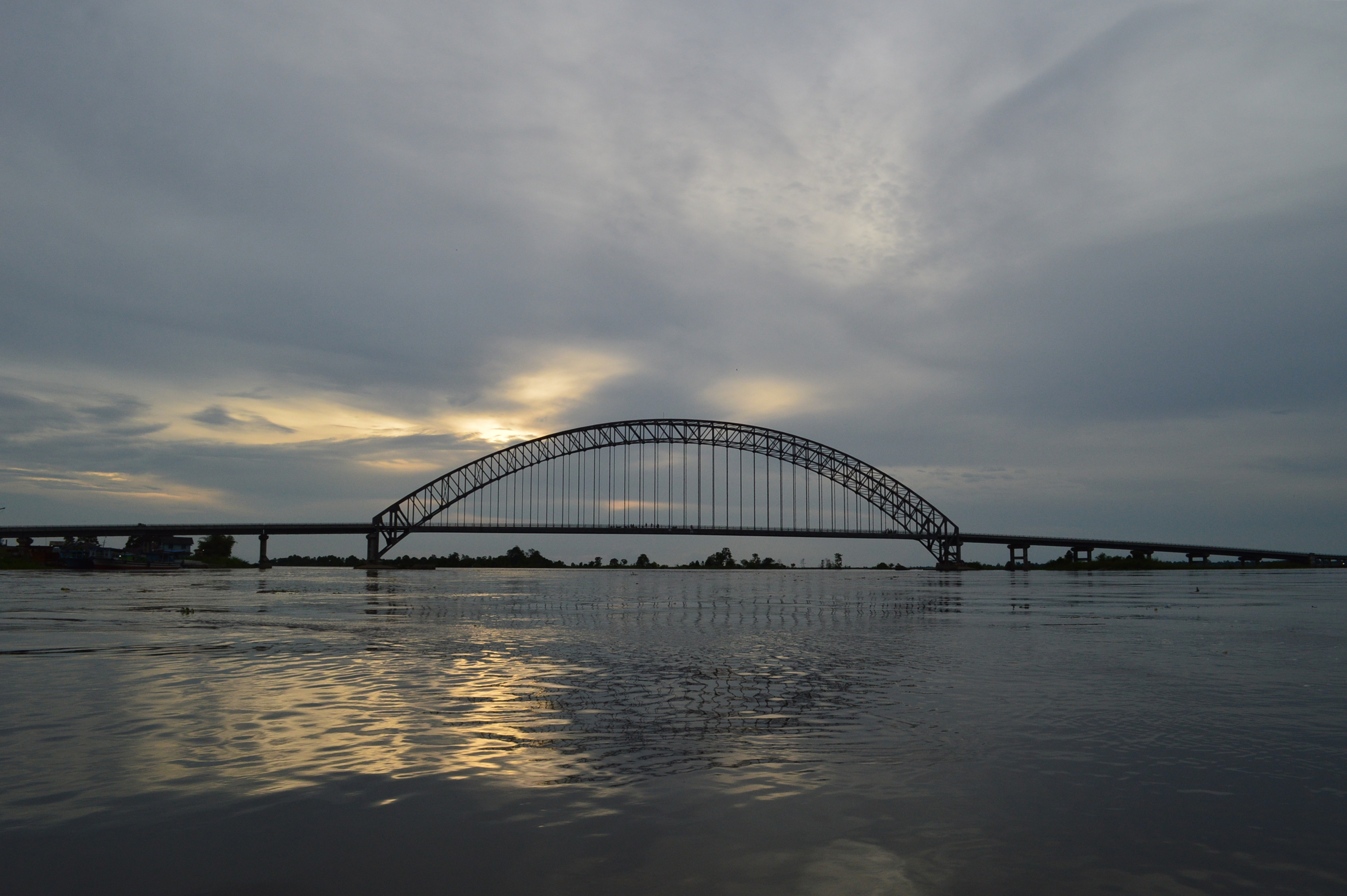 Jembatan Martadipura di kecamatan Kota Bangun, Kabupaten Kutai Kartanegara, Kalimantan Timur.